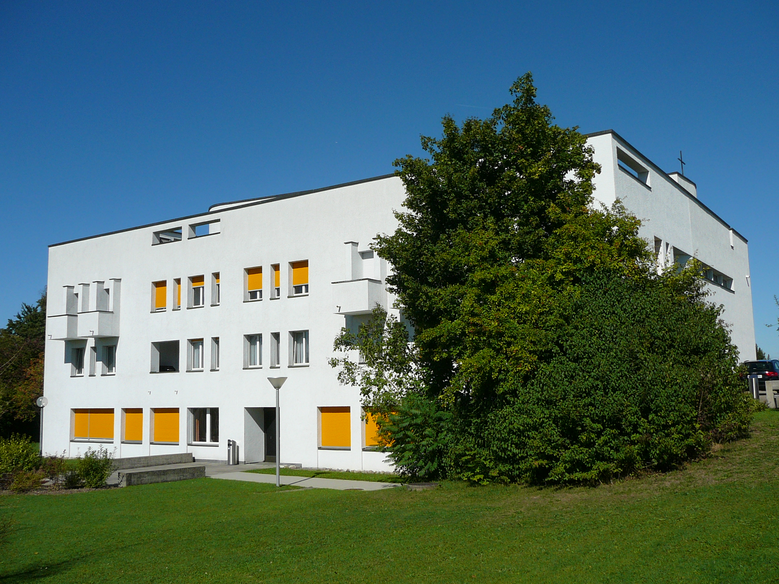 Römisch-katholische Pfarrkirche St. Petrus Rümlang, Ansicht von Südwesten